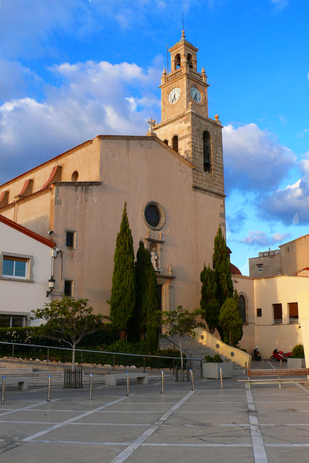 Església de Sant Pere, al Masnou (Maresme).